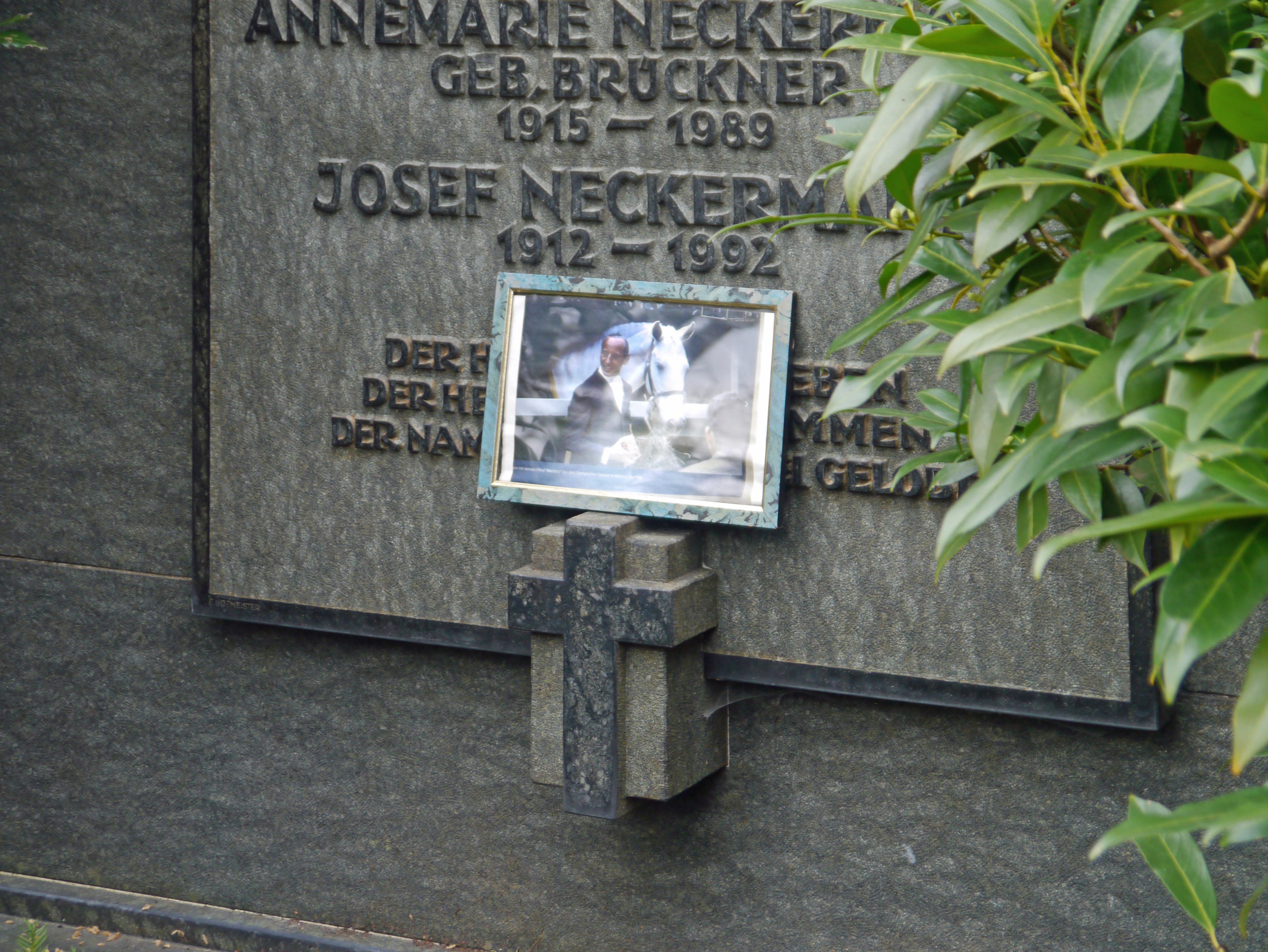 Foto und Namen von Josef Neckermann am Familiengrab der Familie Neckermann auf dem Frankfurter Hauptfriedhof.